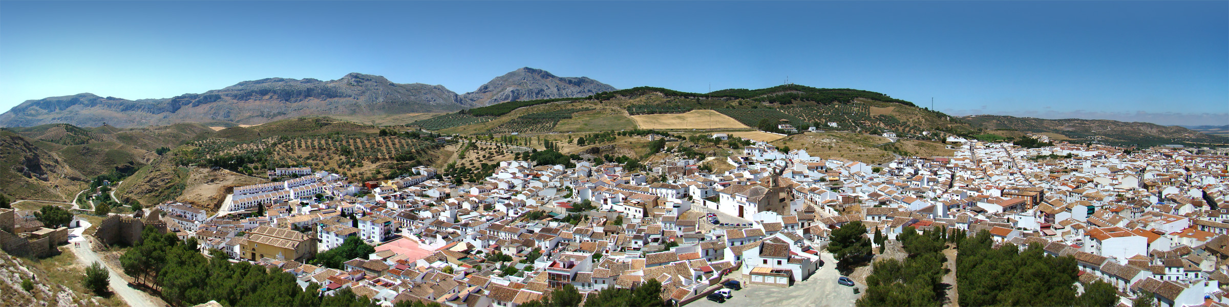 Antequera, Andalucía, España.